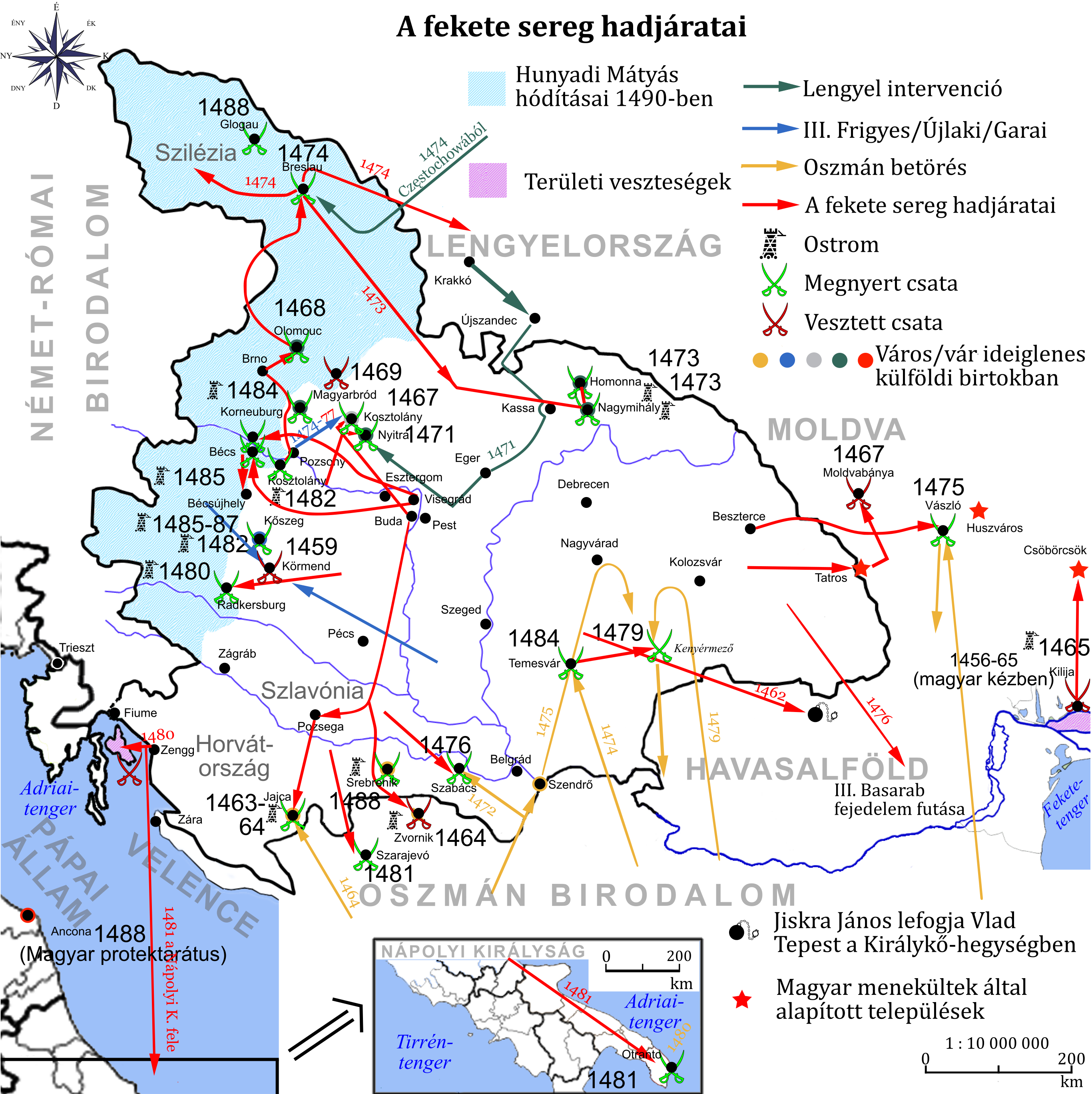 Mátyás király seregének hódításai